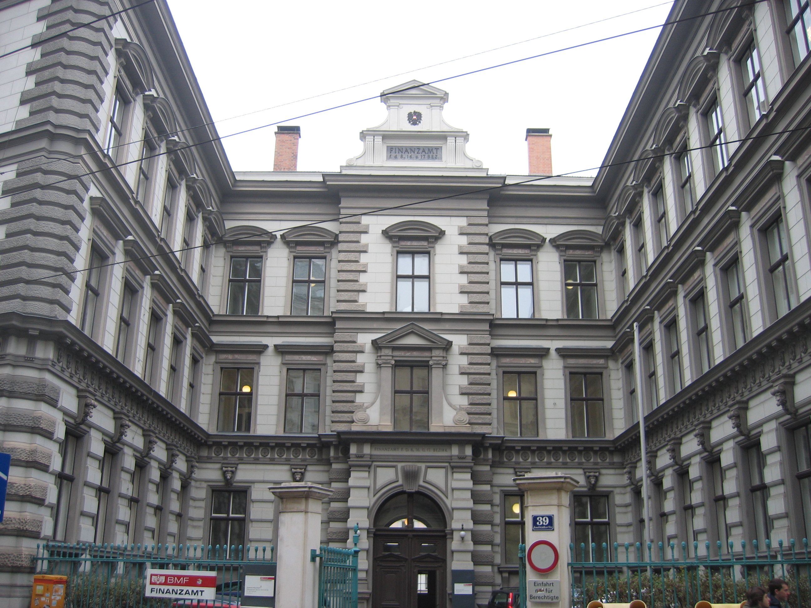 Das Palais Strozzi in Wien